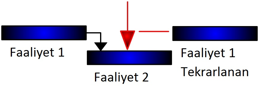 Tekrarlanan Faaliyet